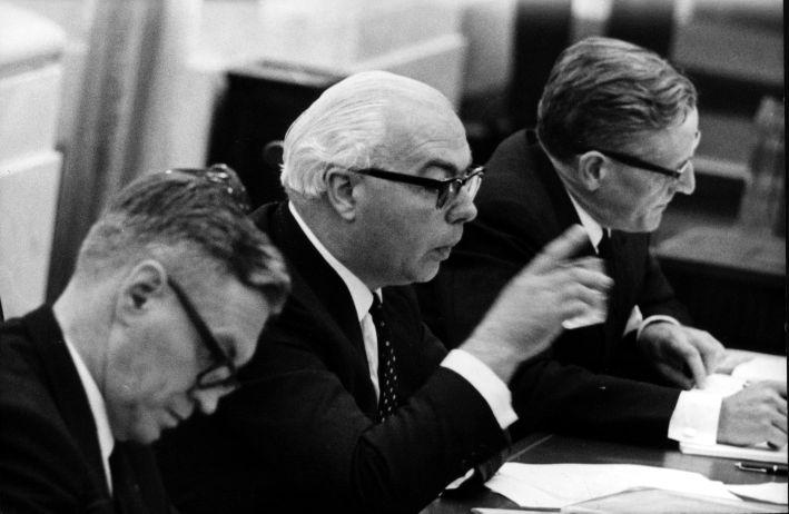 De Tweede Kamer behandelt de nota over de volksgezondheid. Achter de regeringstafel, minister Veldkamp, staatssecretaris de Meyer, staatssecretaris Bartels. Den Haag ('s-Gravenhage), 21 september 1966.